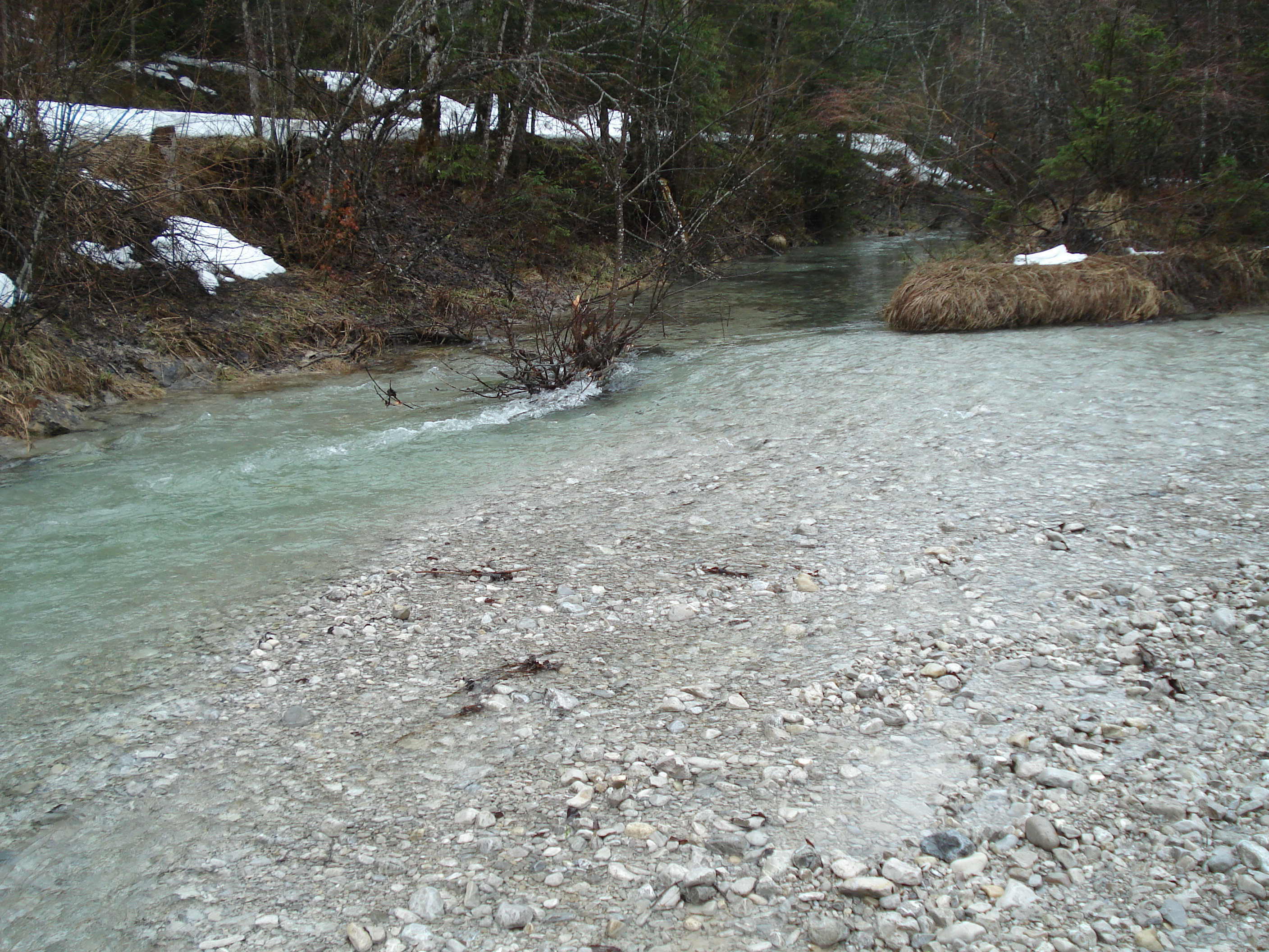 Die Linder (rechts) mündet in den Bach aus den Großen Ammerquellen (hinten) und trägt von dort den Namen Ammer